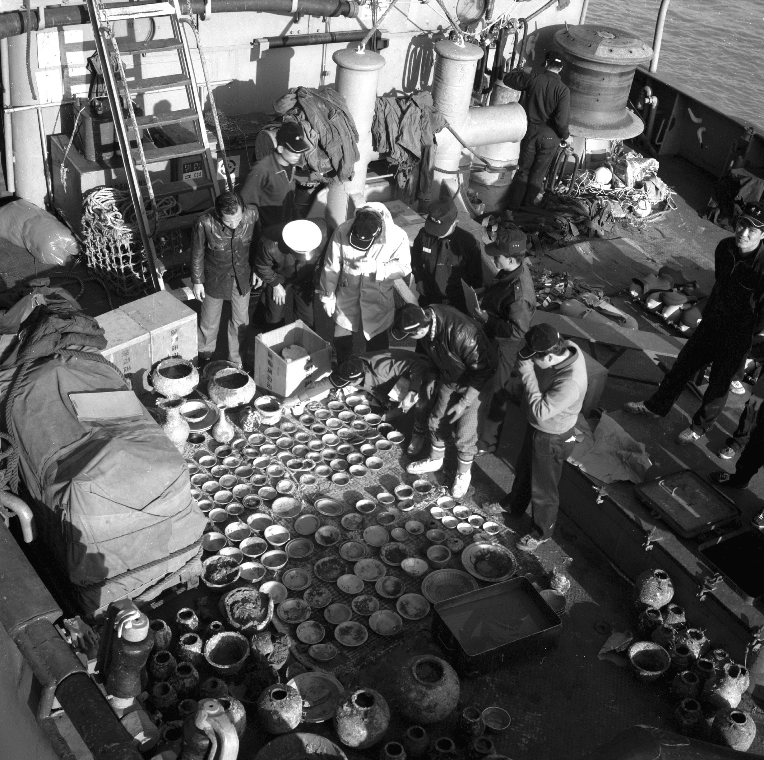 촬영일 : 1976년 11월 15일 촬영장소 : 대한민국 신안 앞바다 참석자 : 미상 인물상세정보 : 미상(전체) 관련내용 : 신안 앞바다 중국 송-원대 도자기 인양작업 현장